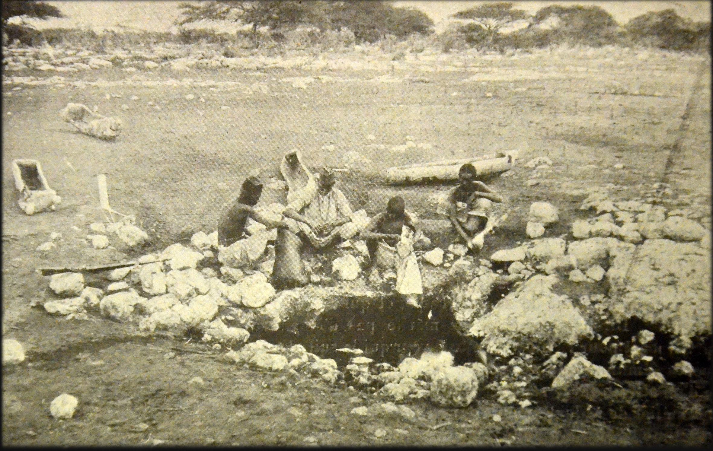 Photo ancienne,légendée "Un puits dans le désert des Somalis", dans un article de la "Revue illustrée" (Tome relié 1902) consacré à l'Abyssinie. .